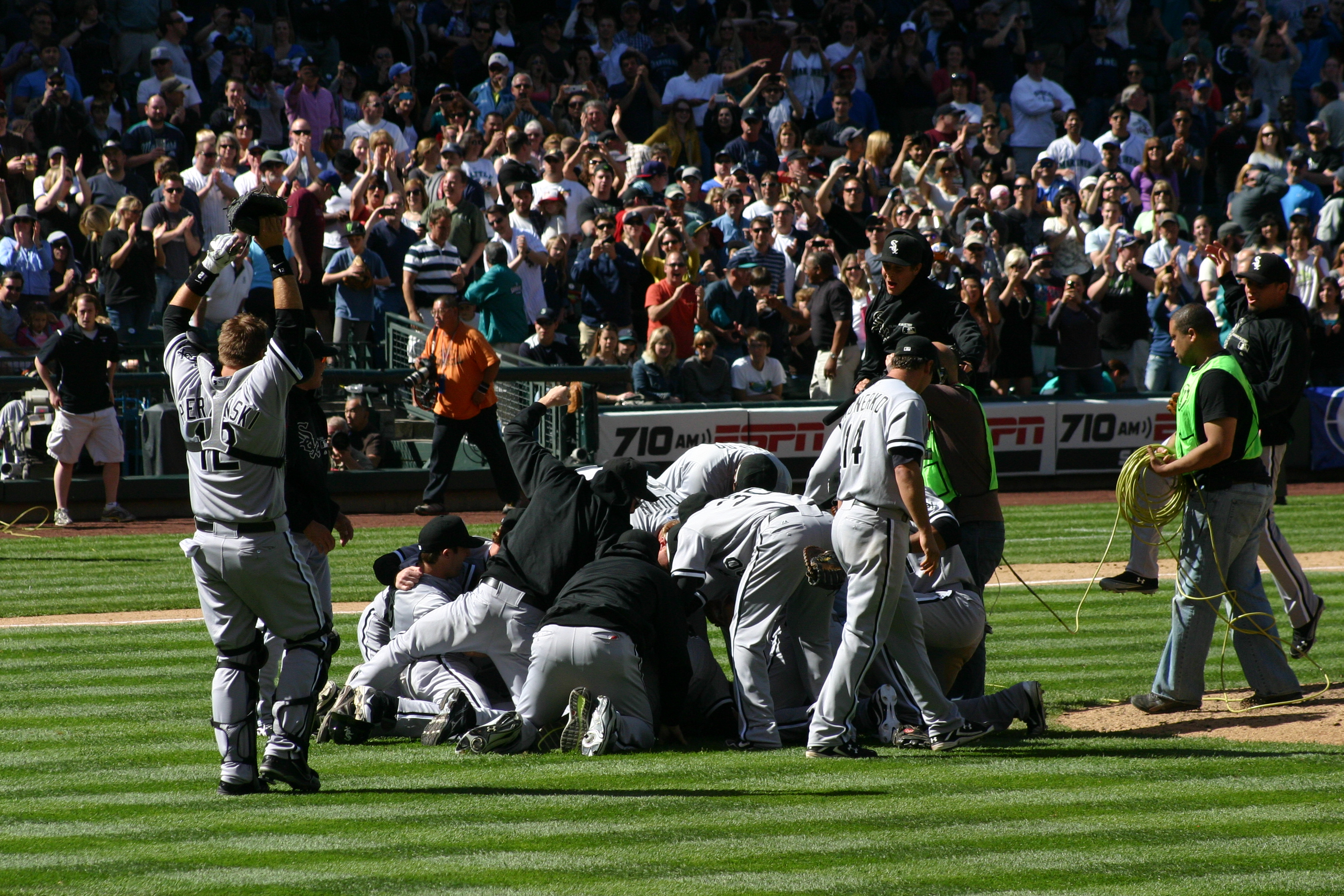 2012 04 Seattle Baseball Weekend 321